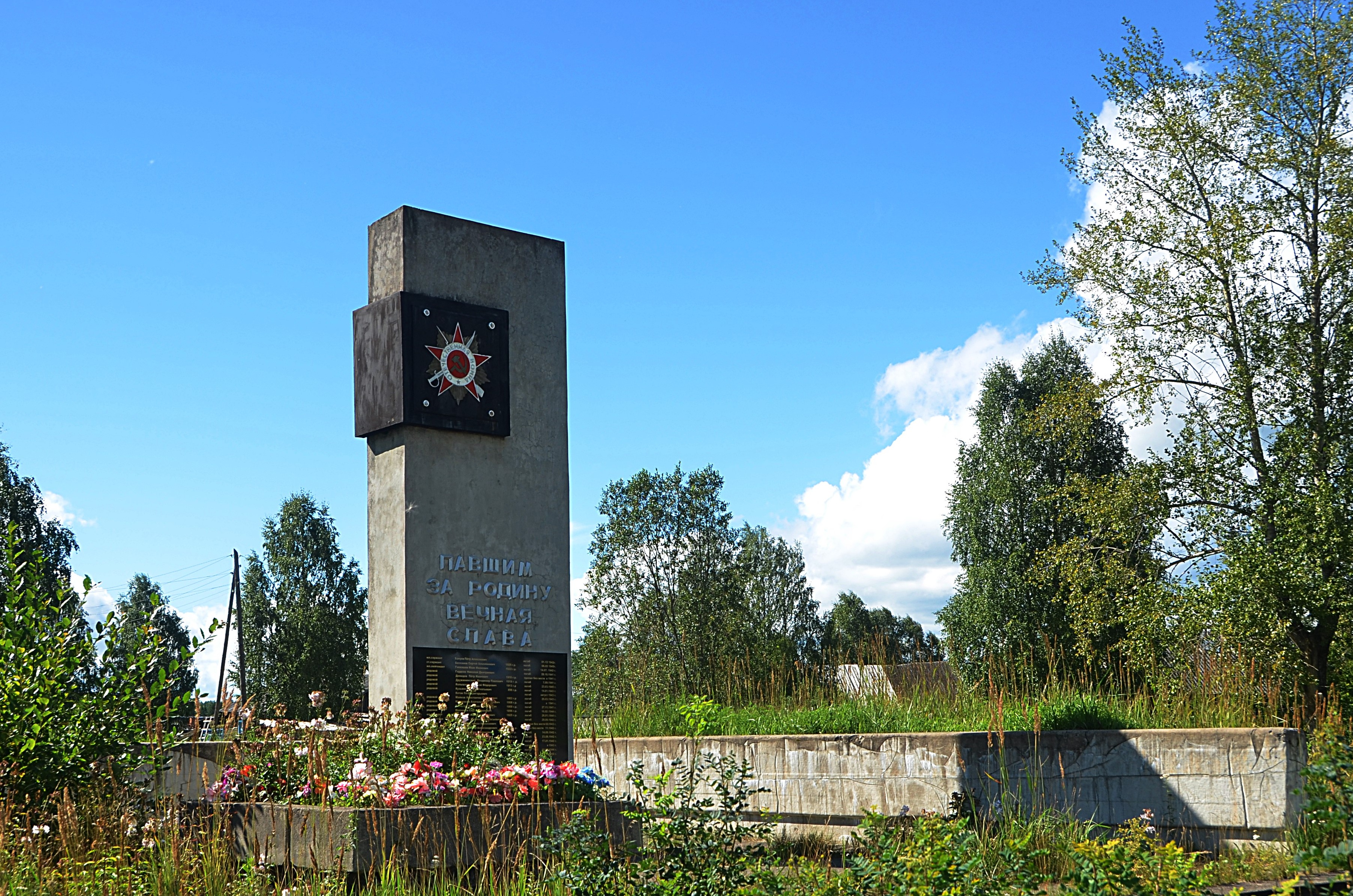 Памятник павшим за Родину